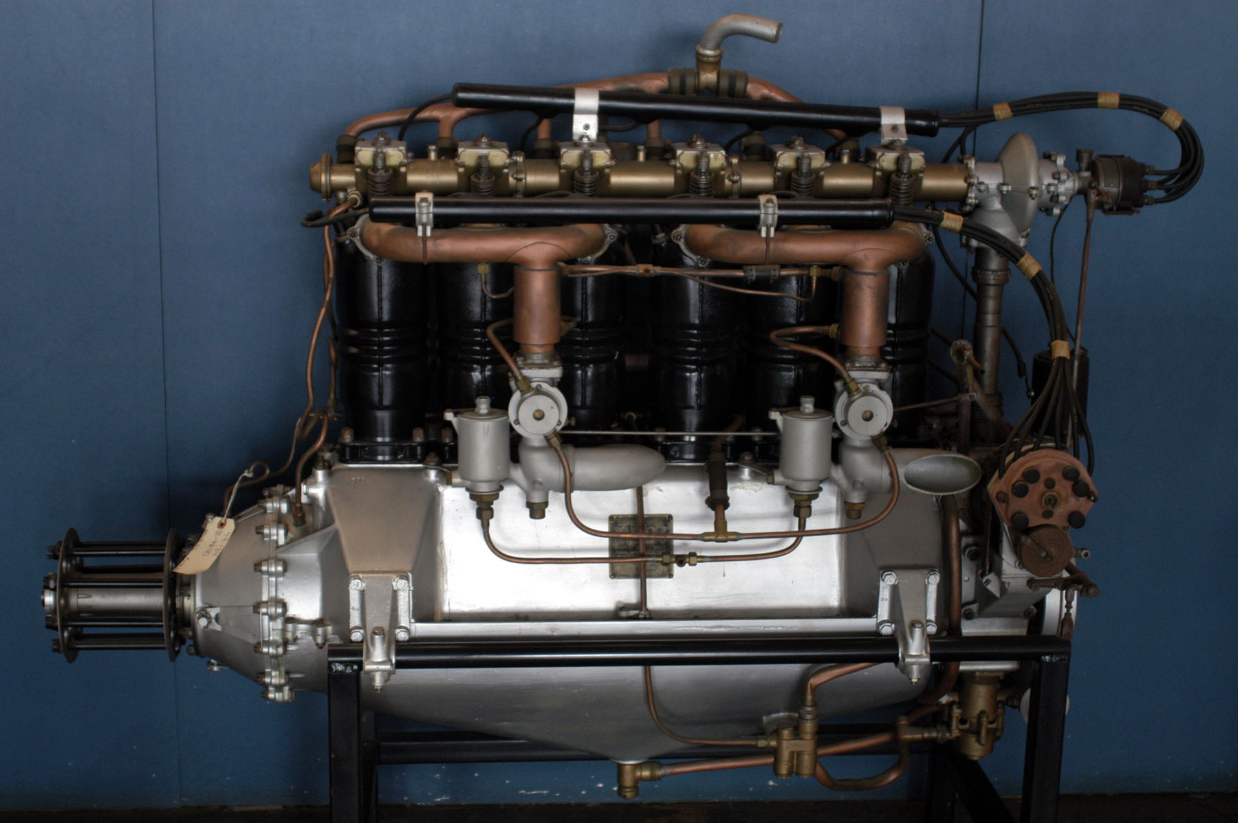 Rolls-Royce Hawk USAF Bild Nr. 070110-F-1234S-024